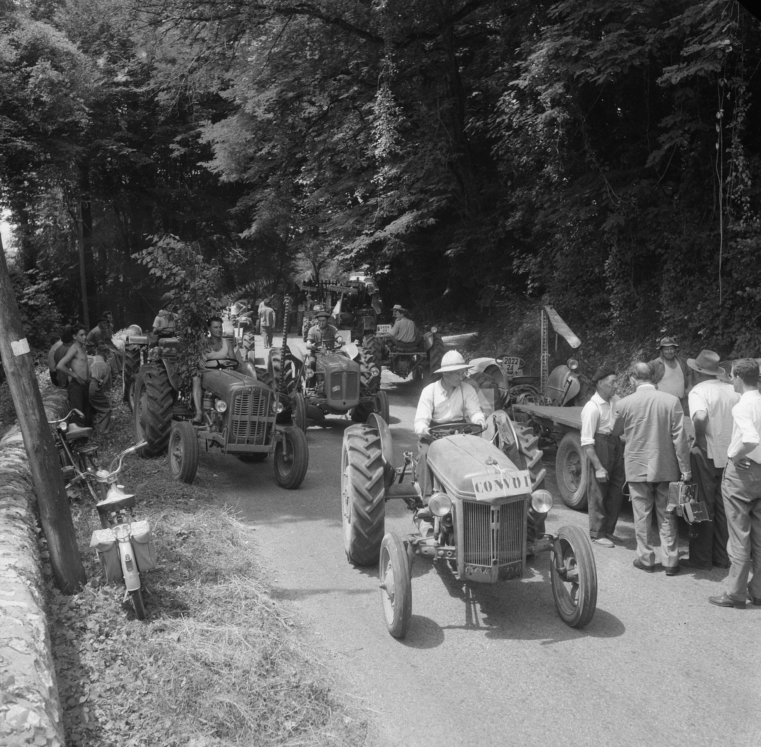 Collectie / Archief : Fotocollectie Anefo Reportage / Serie : [ onbekend ] Beschrijving : Solidariteitsstaking in Frankrijk. Weg versperd met tractoren Datum : 24 juni 1961 Locatie : Frankrijk Trefwoorden : TRACtorens Fotograaf : Nijs, Jac. de / Anefo Auteursrechthebbende : Nationaal Archief Materiaalsoort : Negatief (zwart/wit) Nummer archiefinventaris : bekijk toegang 2.24.01.03 Bestanddeelnummer : 912-6434